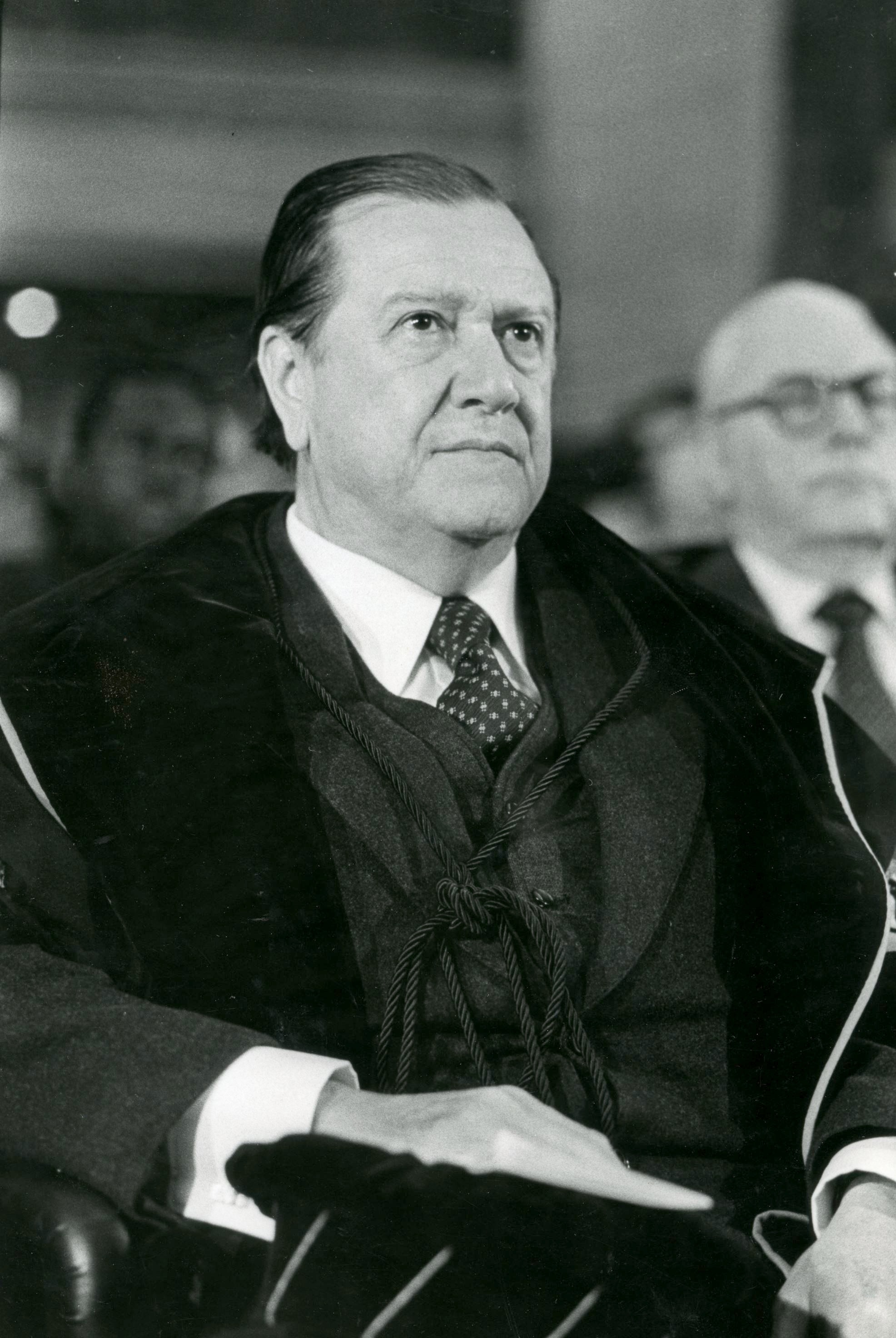 Rafael Caldera al recibir el Doctorado Honoris Causa de la Universidad de Lovaina